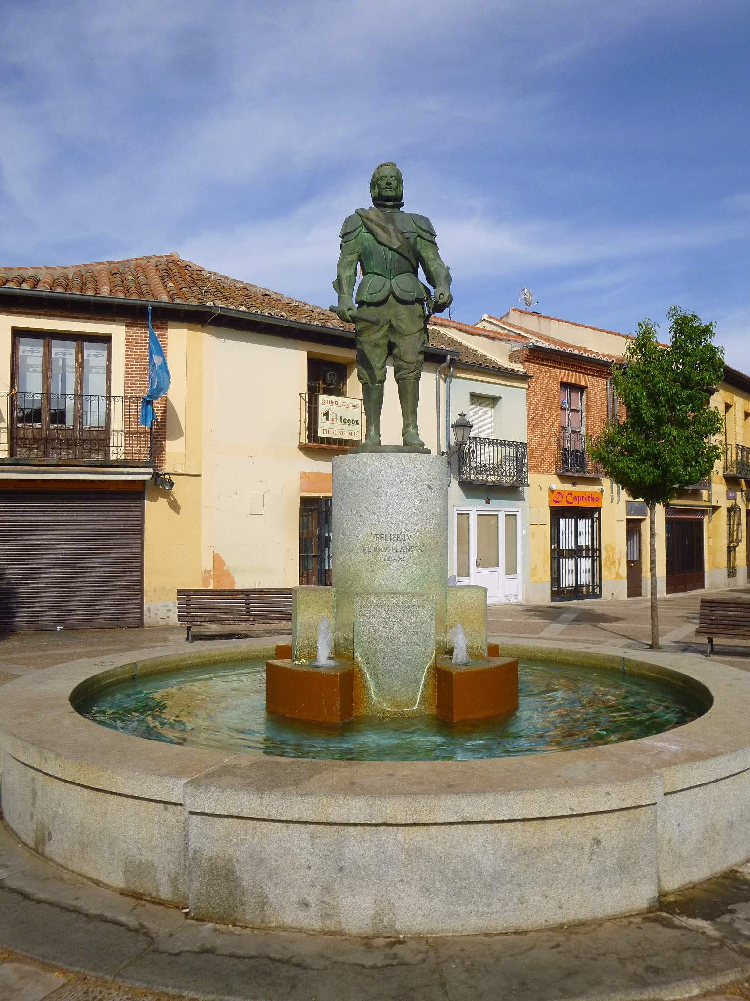 Navalcarnero - Monumento a Felipe IV